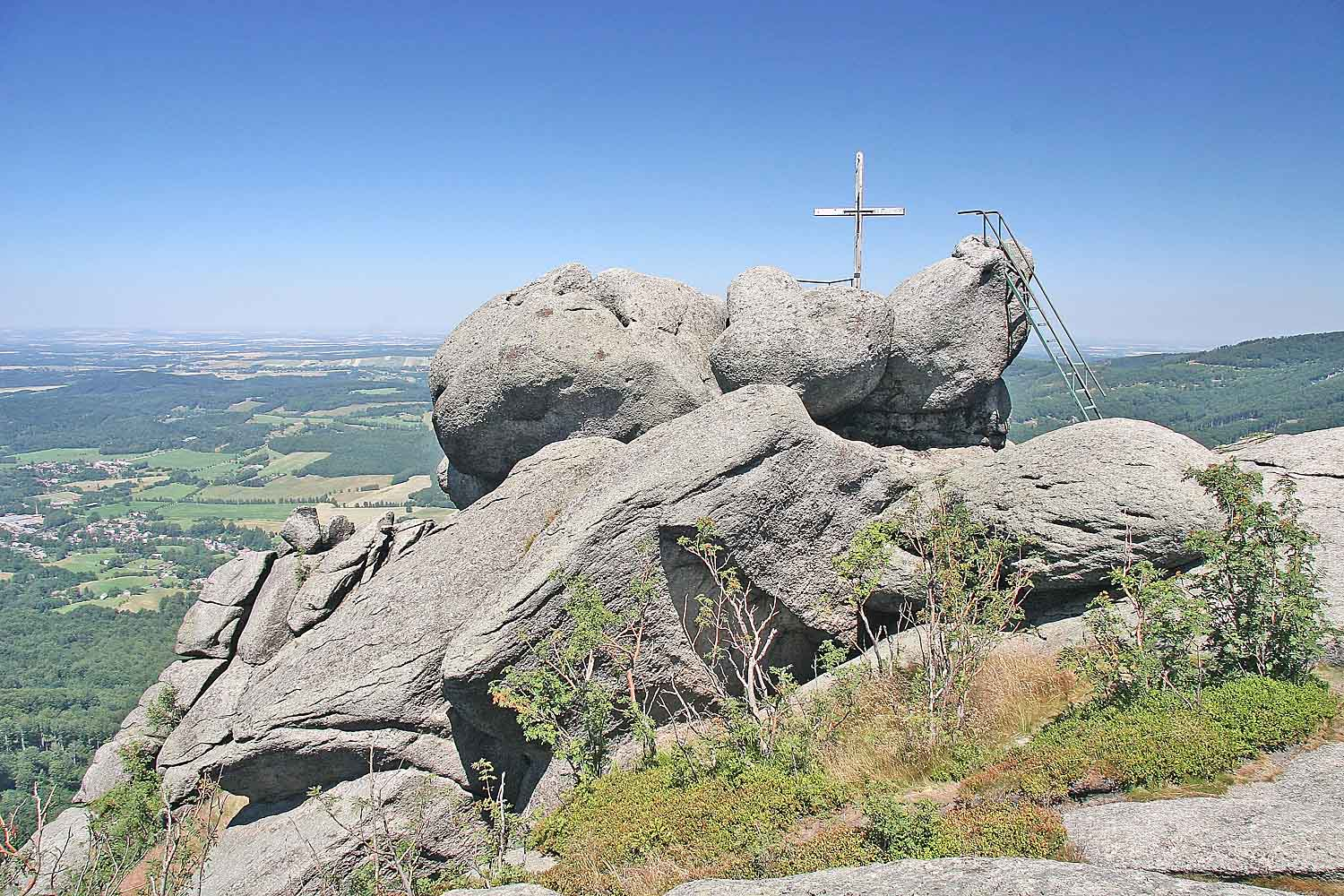 Frýdlantské cimbuří - vyhlídka, Jizera Mountains, district Liberec, Czech Republic Autor: Prazak date: 19. 7. 2006